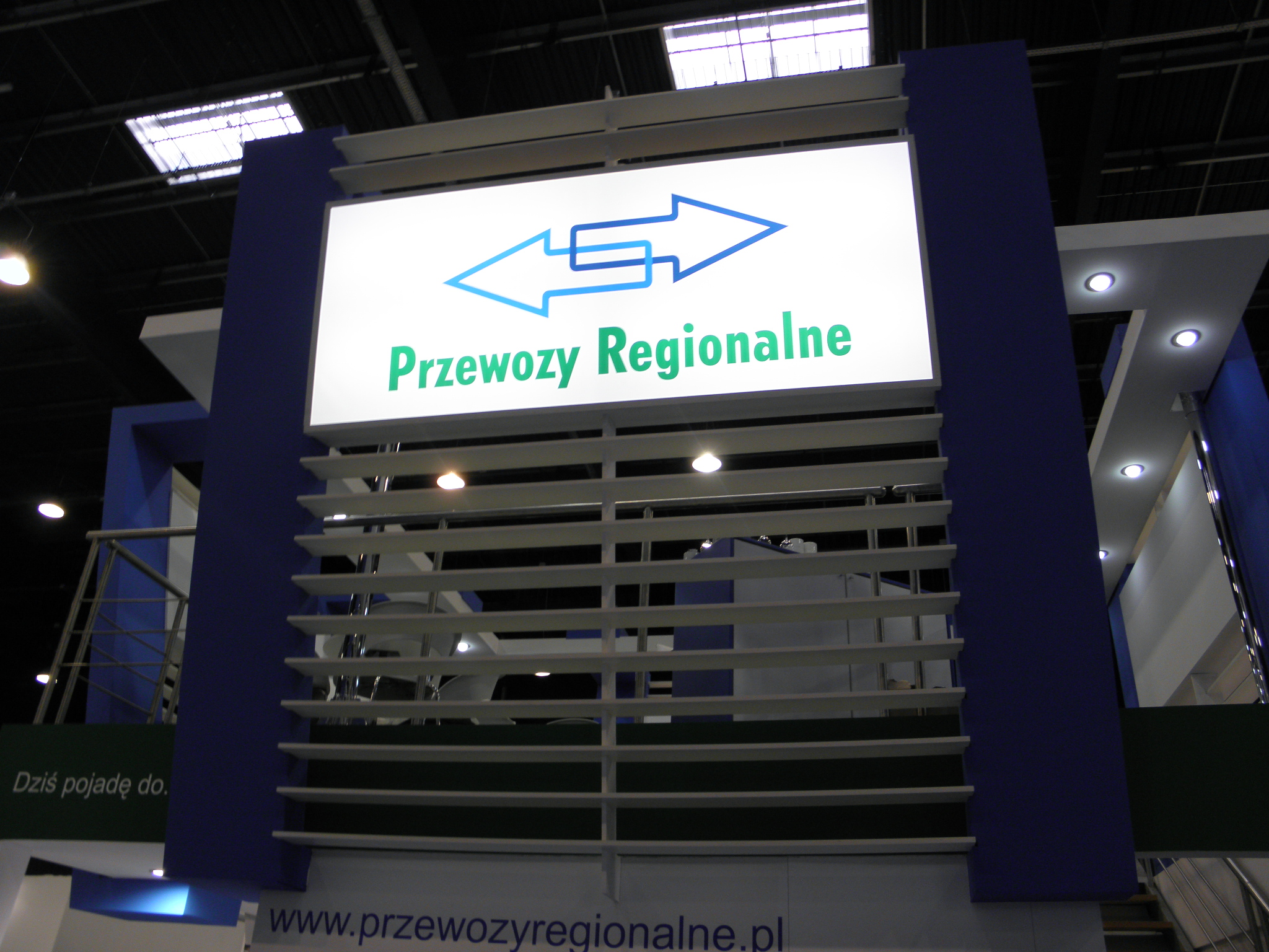 Photo from Trako 2013, Gdańsk/Danzig